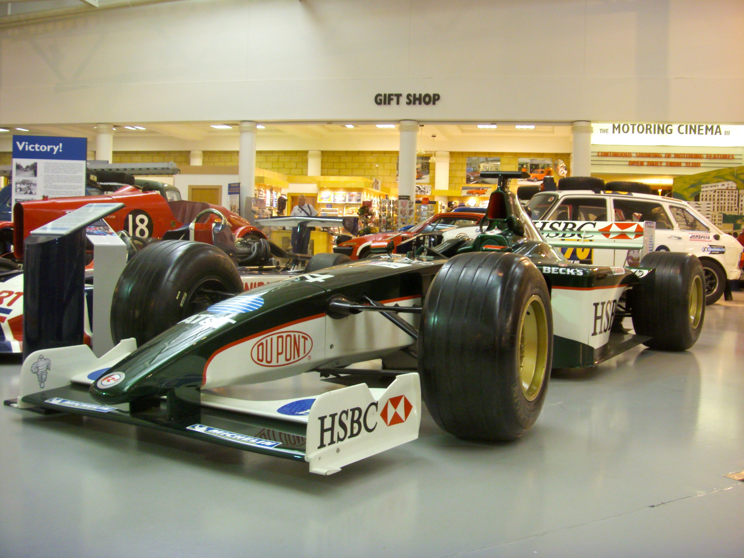 2003 Jaguar R4 Formula 1 Car